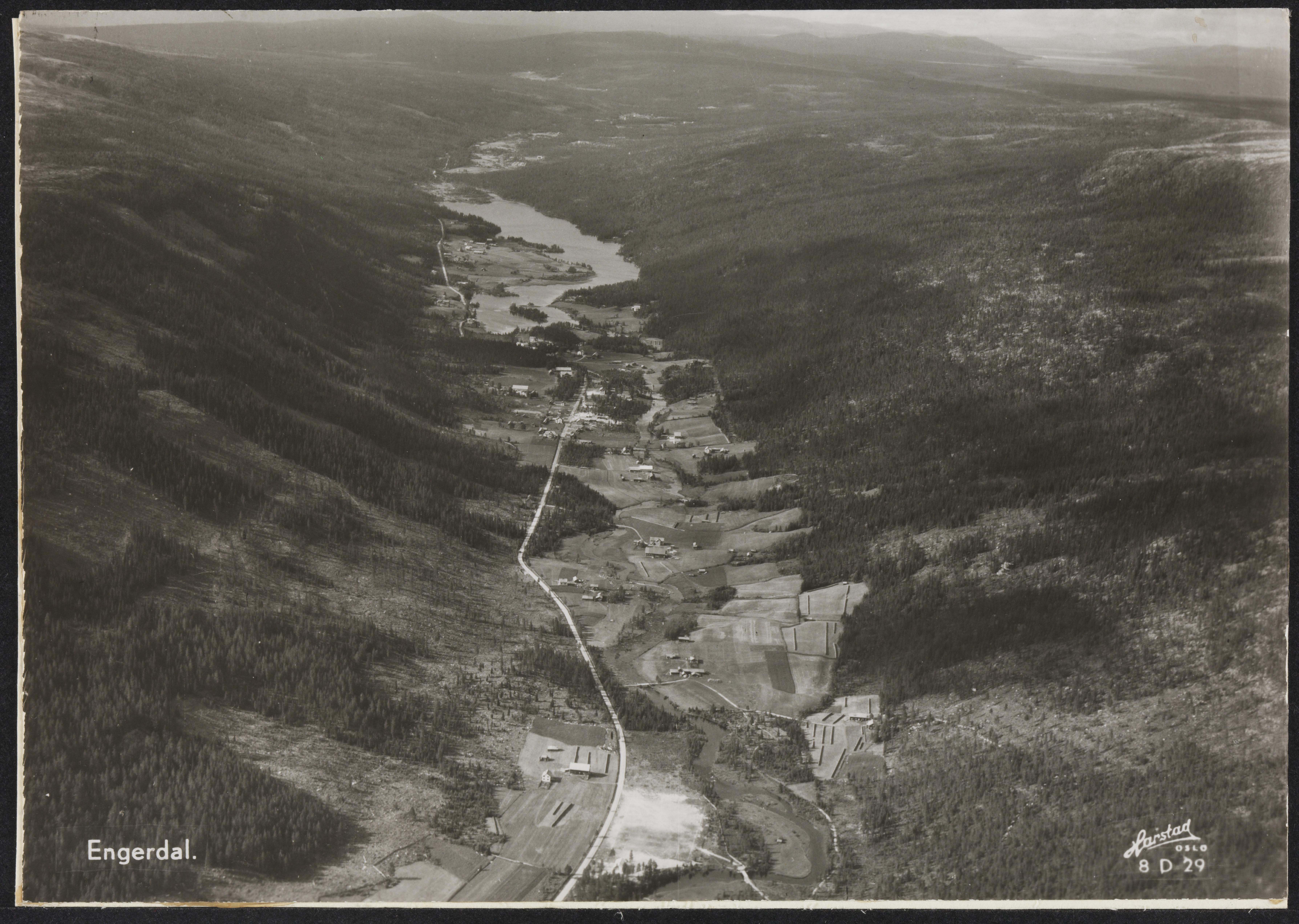 Bildet er hentet fra Nasjonalbibliotekets bildesamling Engerdal, Hedmark Utsikt over tettstedet Engerdal (med Engerdal kirke til høyre for veien), mot innsjøen Lille Engeren sørfra.